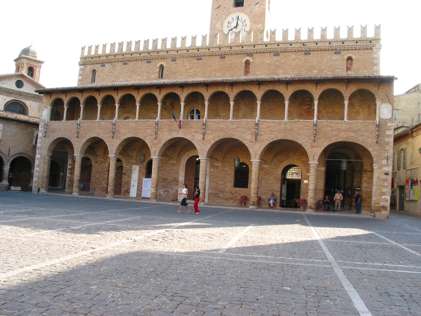 Palazzo Municipale ad Offida, Marche, Italiagiu.17.2003 Offida